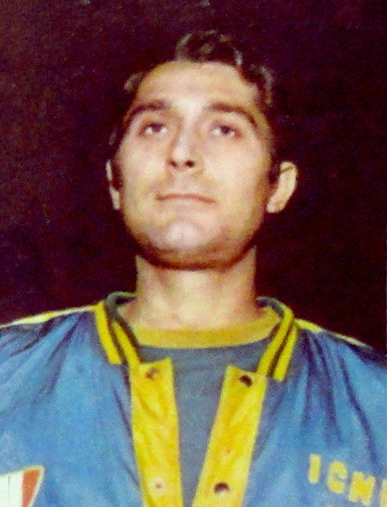 Figurina CAMPIONI DELLO SPORT 1970/71-n.256-FLABOREA-PALLACANESTRO-rec